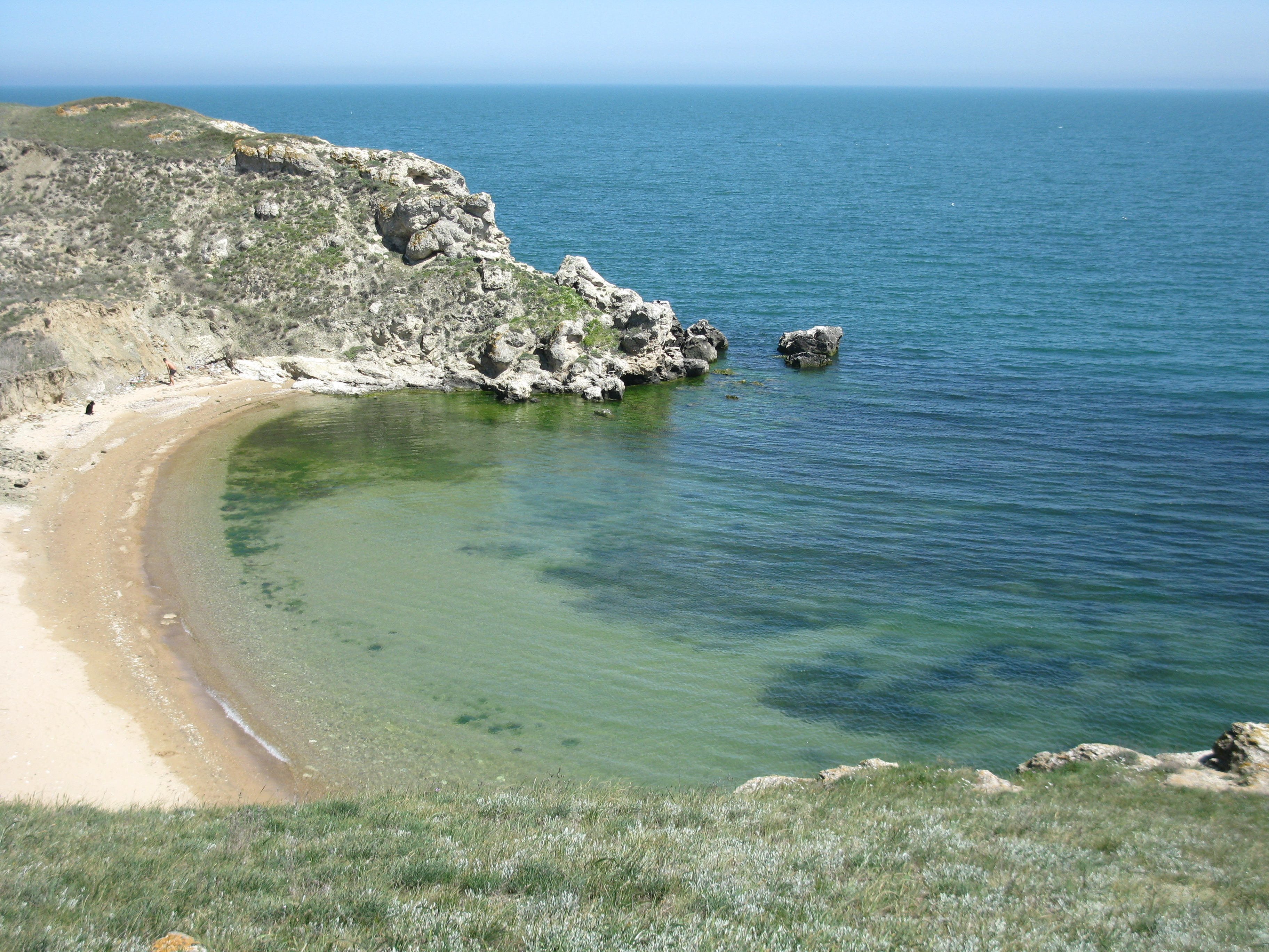 Виды Казантипа